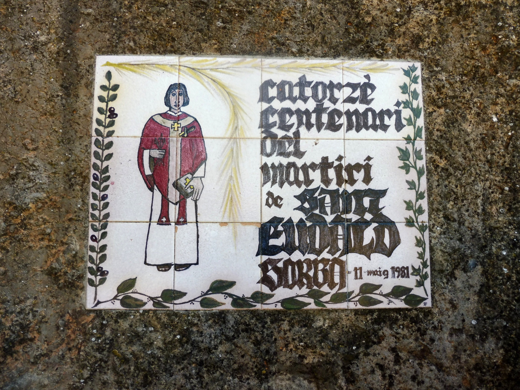 Martyrium de Sant Eudald de Sorba (Montmajor): placa commemorativa